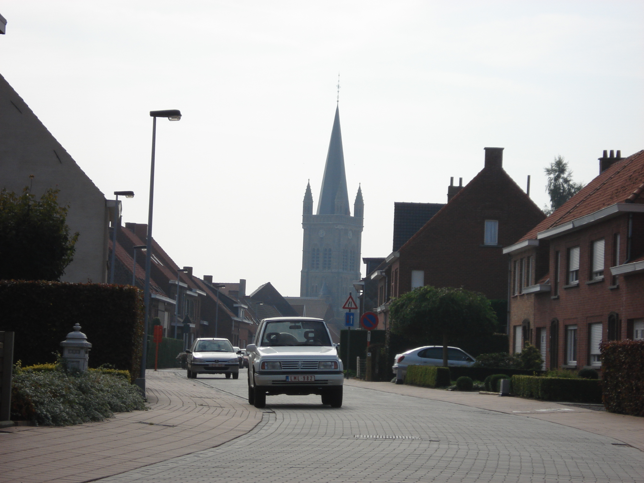 Hooglede